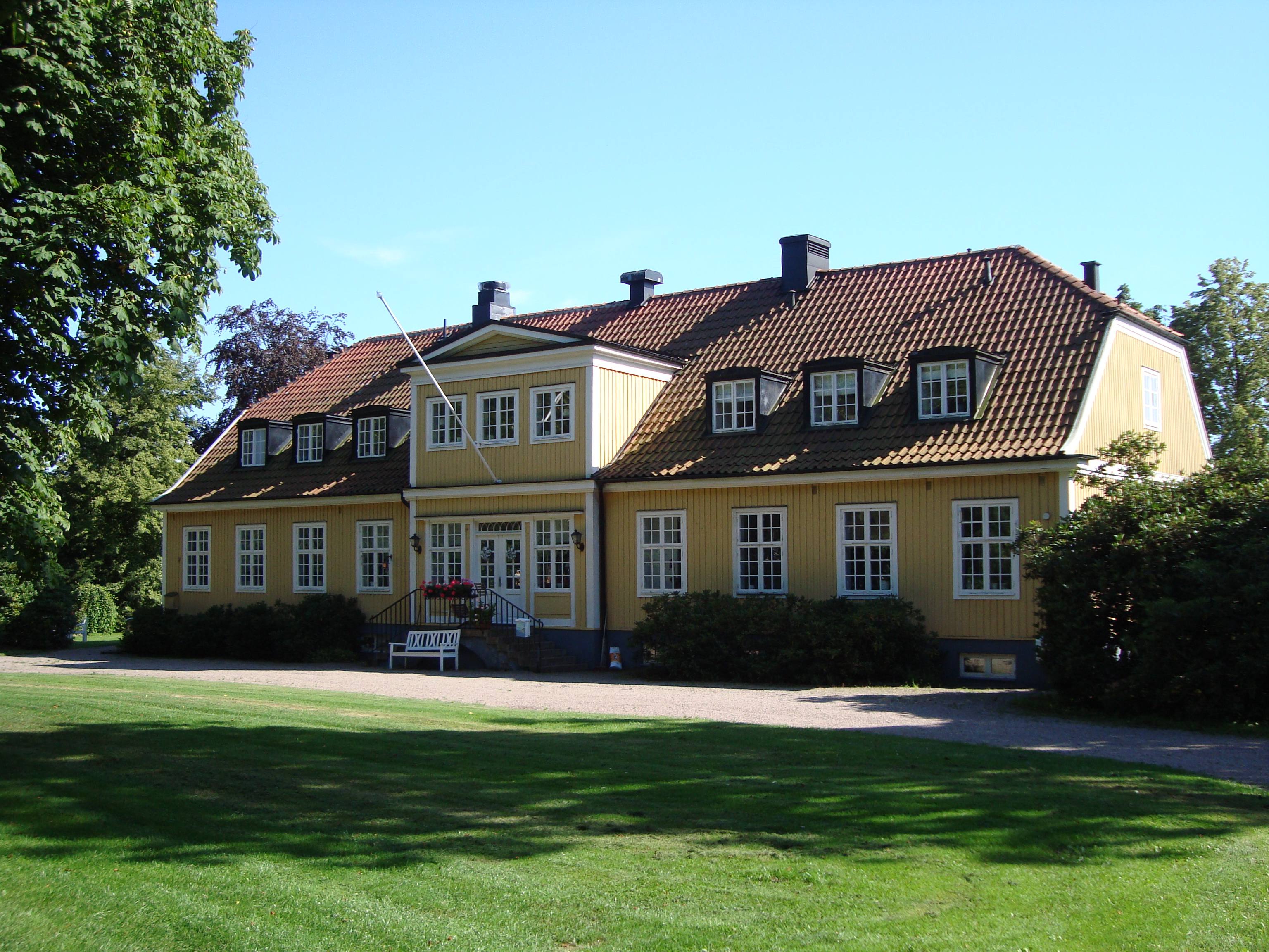 Kontorsvillan i Ramlösa brunnspark i Helsingborg.